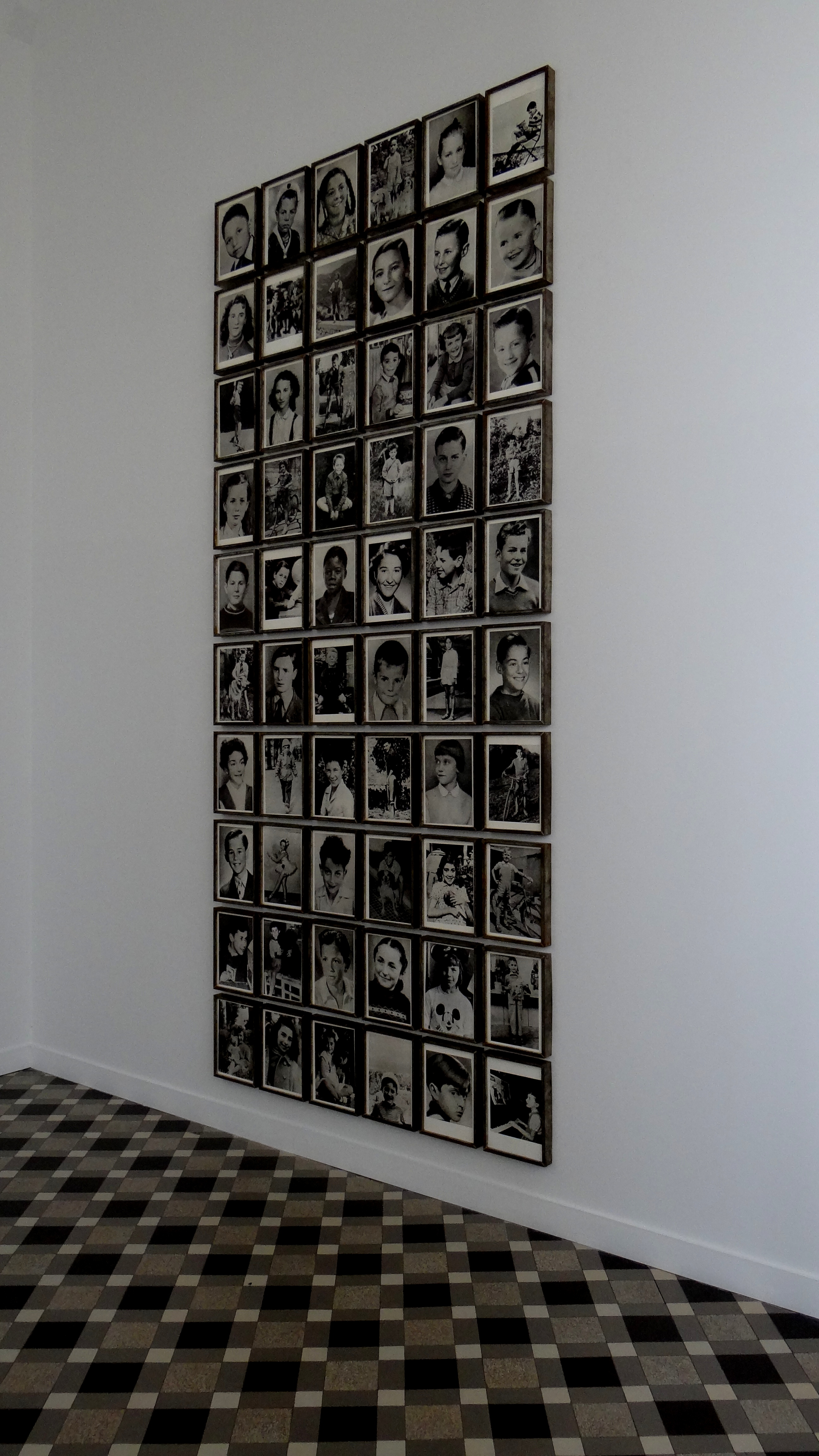 Centre régional de la photographie du Nord Pas-de-Calais - exposition